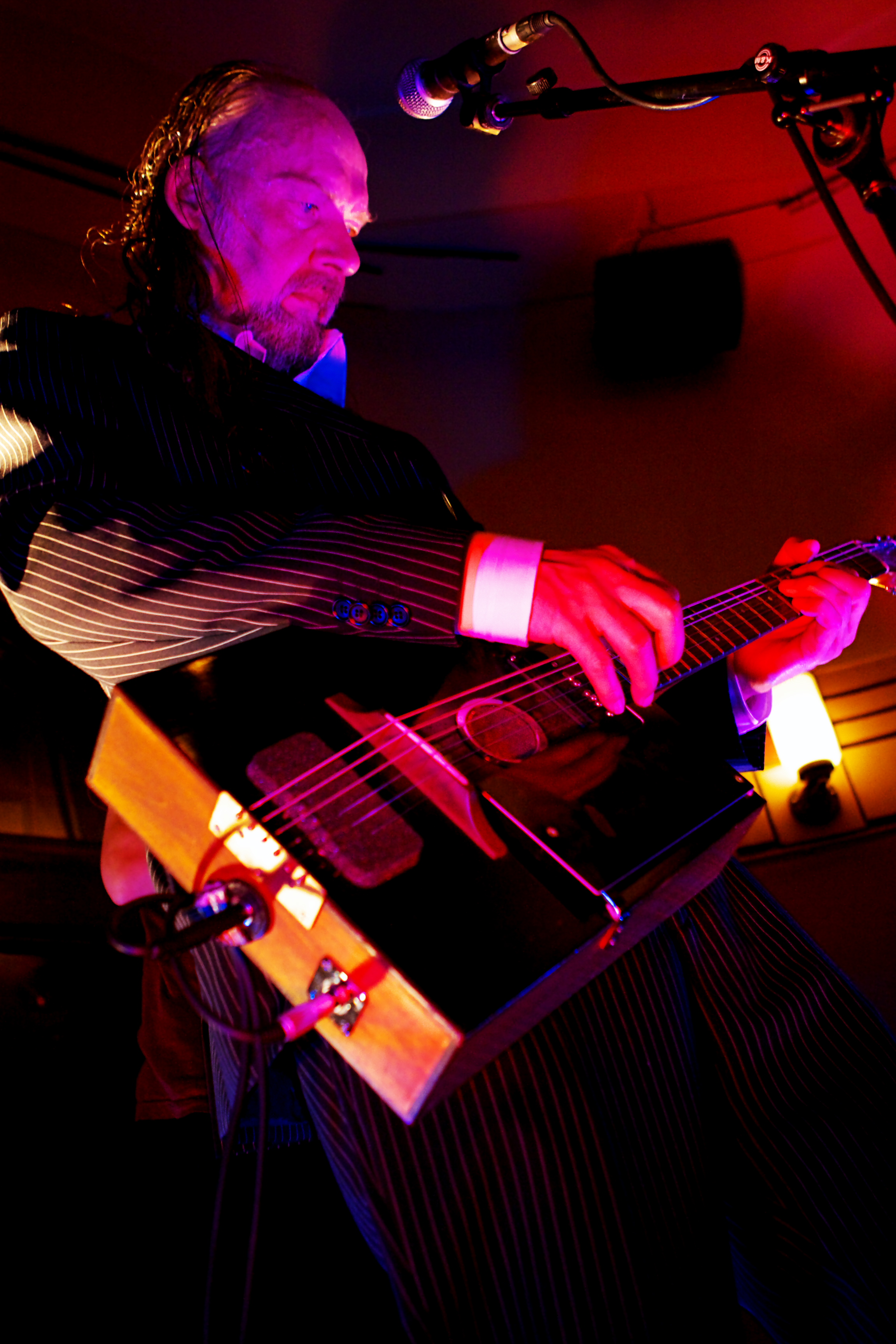 Tuomari Nurmio Taiteiden yönä Juttutuvassa Helsingissä 24.8.2007